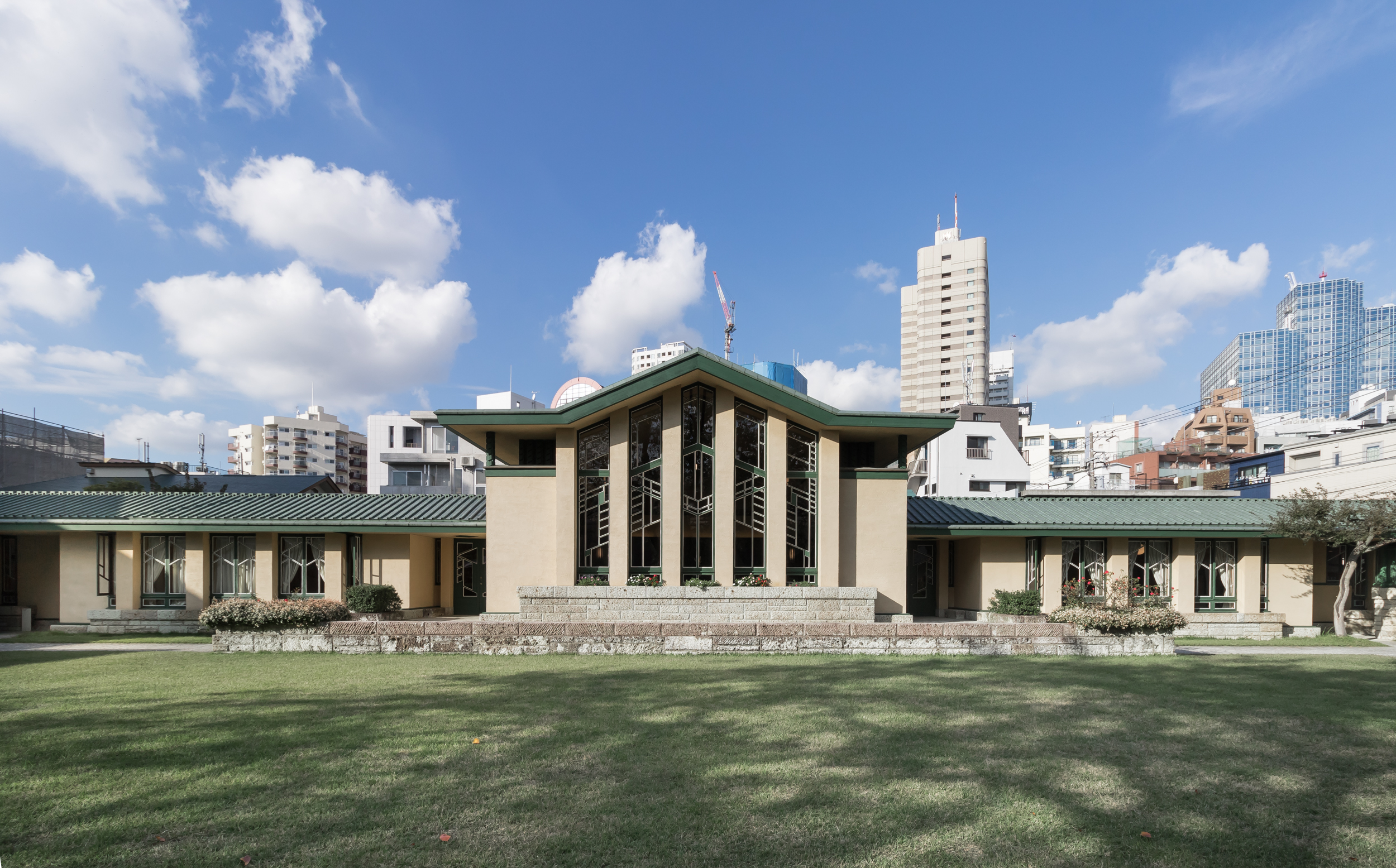 自由学園明日館、中央棟（重要文化財）。東京都豊島区。フランク・ロイド・ライト設計、1922。